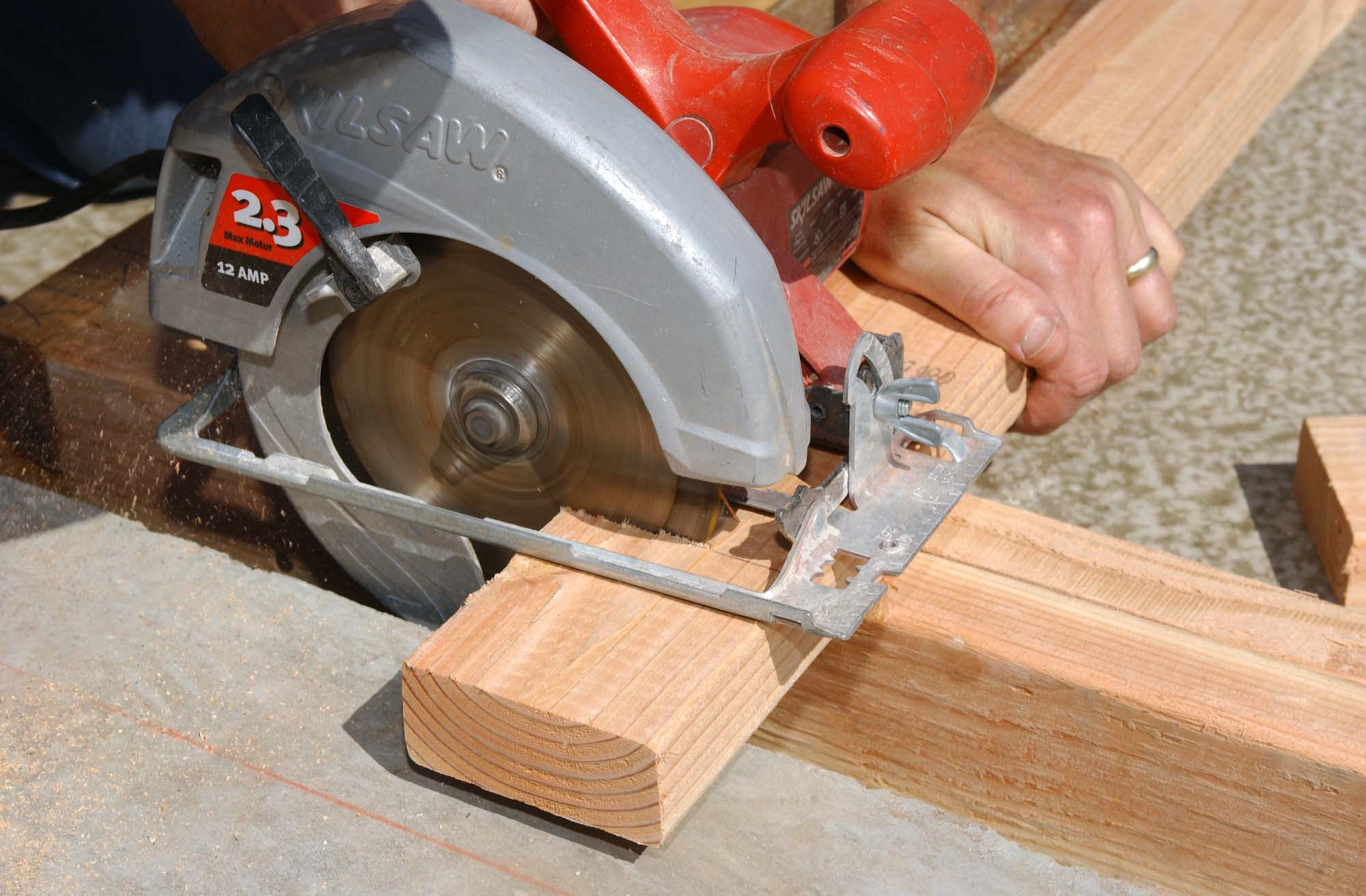 Holzschnitt mit einer Handkreissäge.